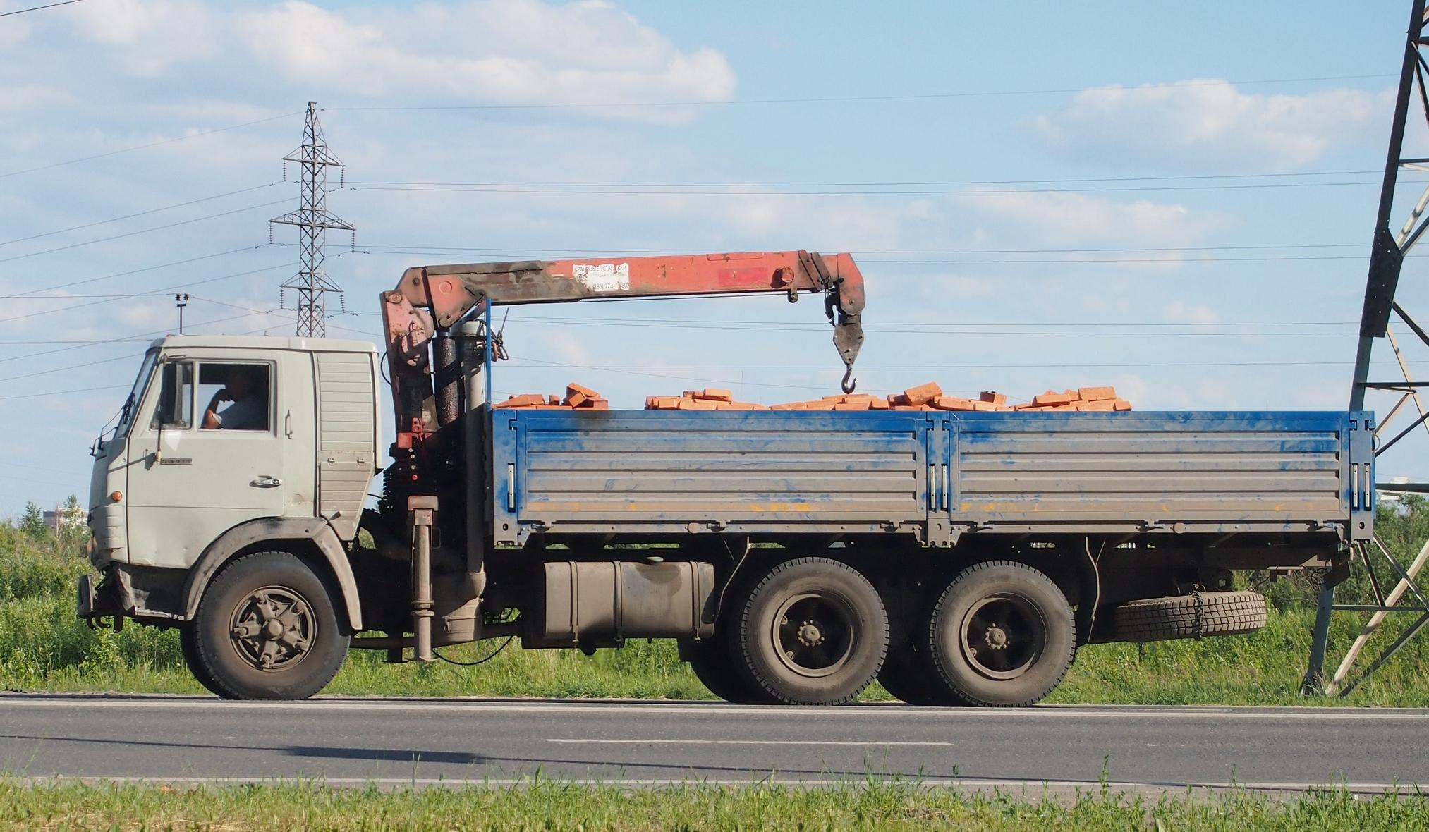 КамАЗ-53212 вТюмени